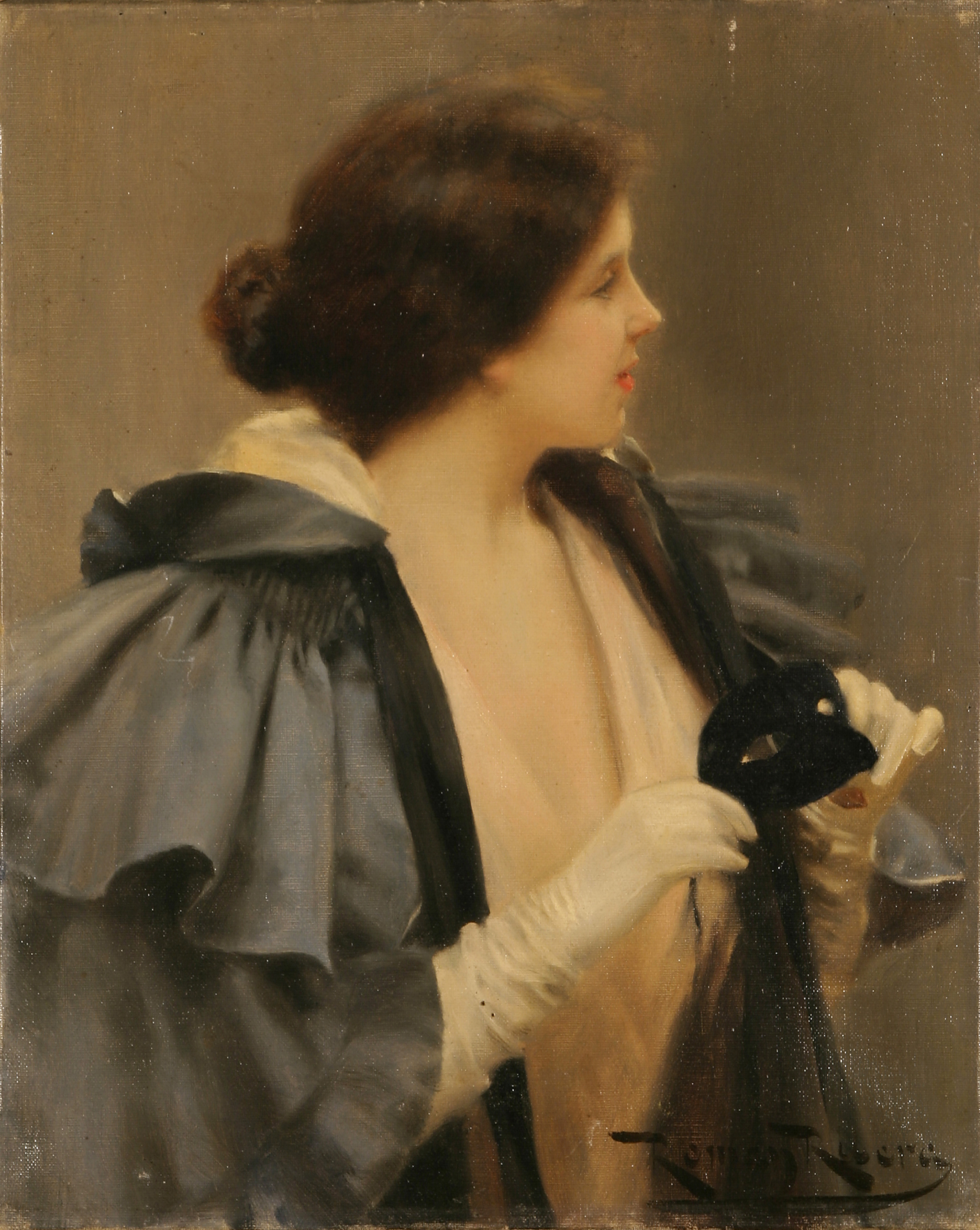 Catalan: Dona amb antifaçlabel QS:Lca,"Dona amb antifaç"